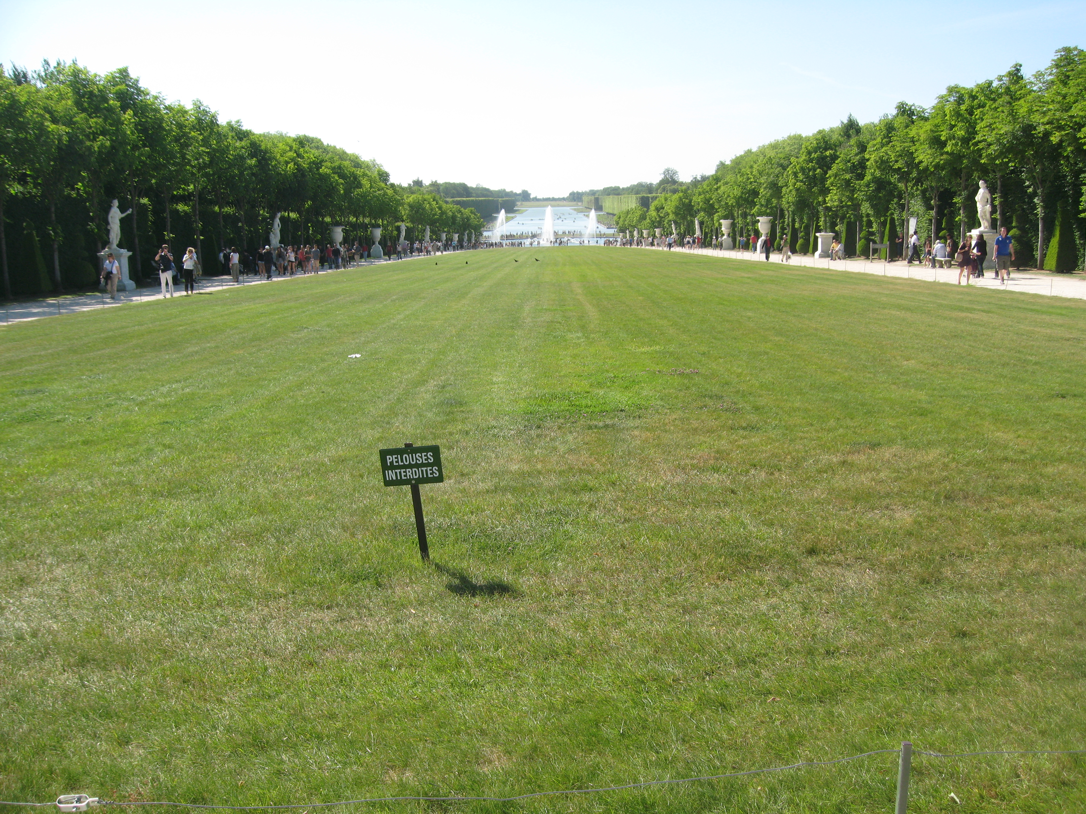 Le tapis vert, ou allée royale, vue depuis le parterre de Latone